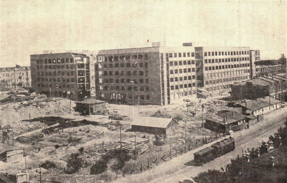 Краевой Дом советов в период строительства предположительно 1939 год, съёмка с проспекта Ворошиловского/ул. Энгельса